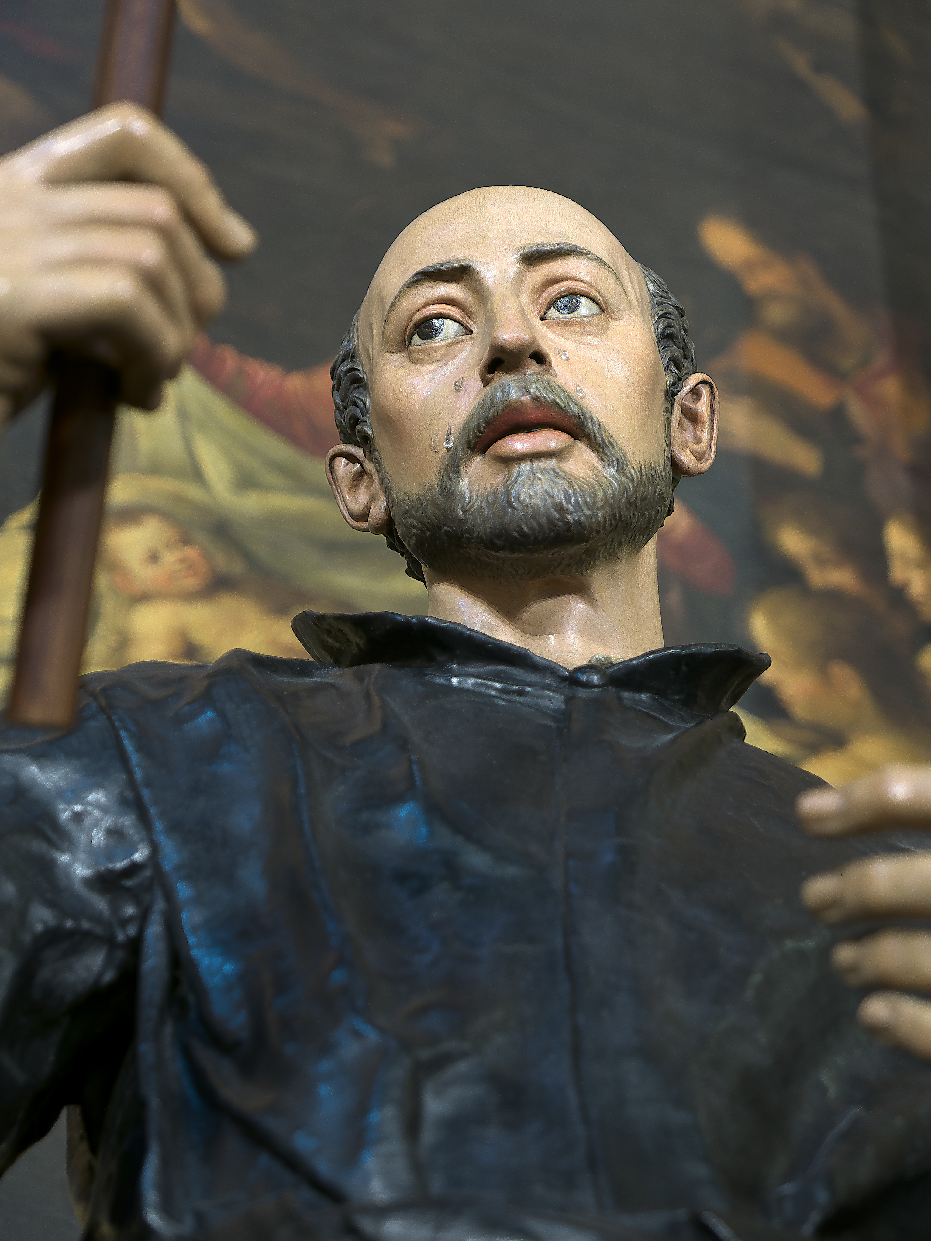 Iglesia de la Anunciación (Sevilla). Escultura de Juan Martínez Montañés con la inestimable policromía de un Francisco Pacheco.